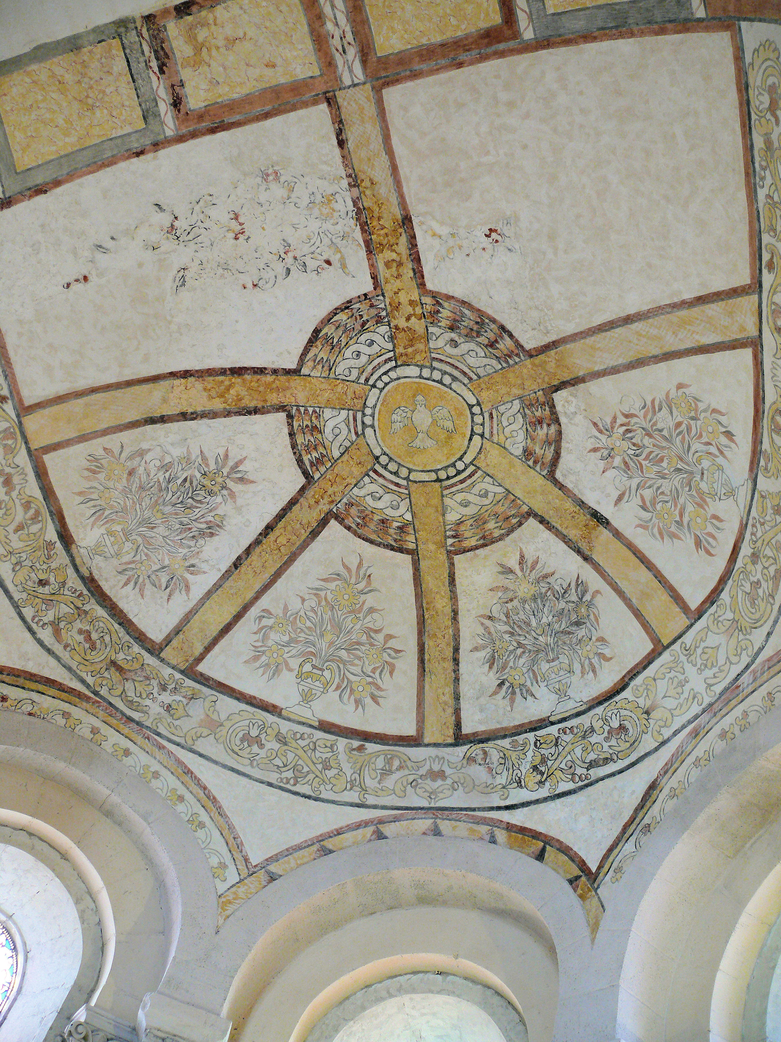 Livernon - Église Saint-Rémy-et-Saint-Namphaise - Peinture de la voûte de l'abside : colombe de la Pentecôte